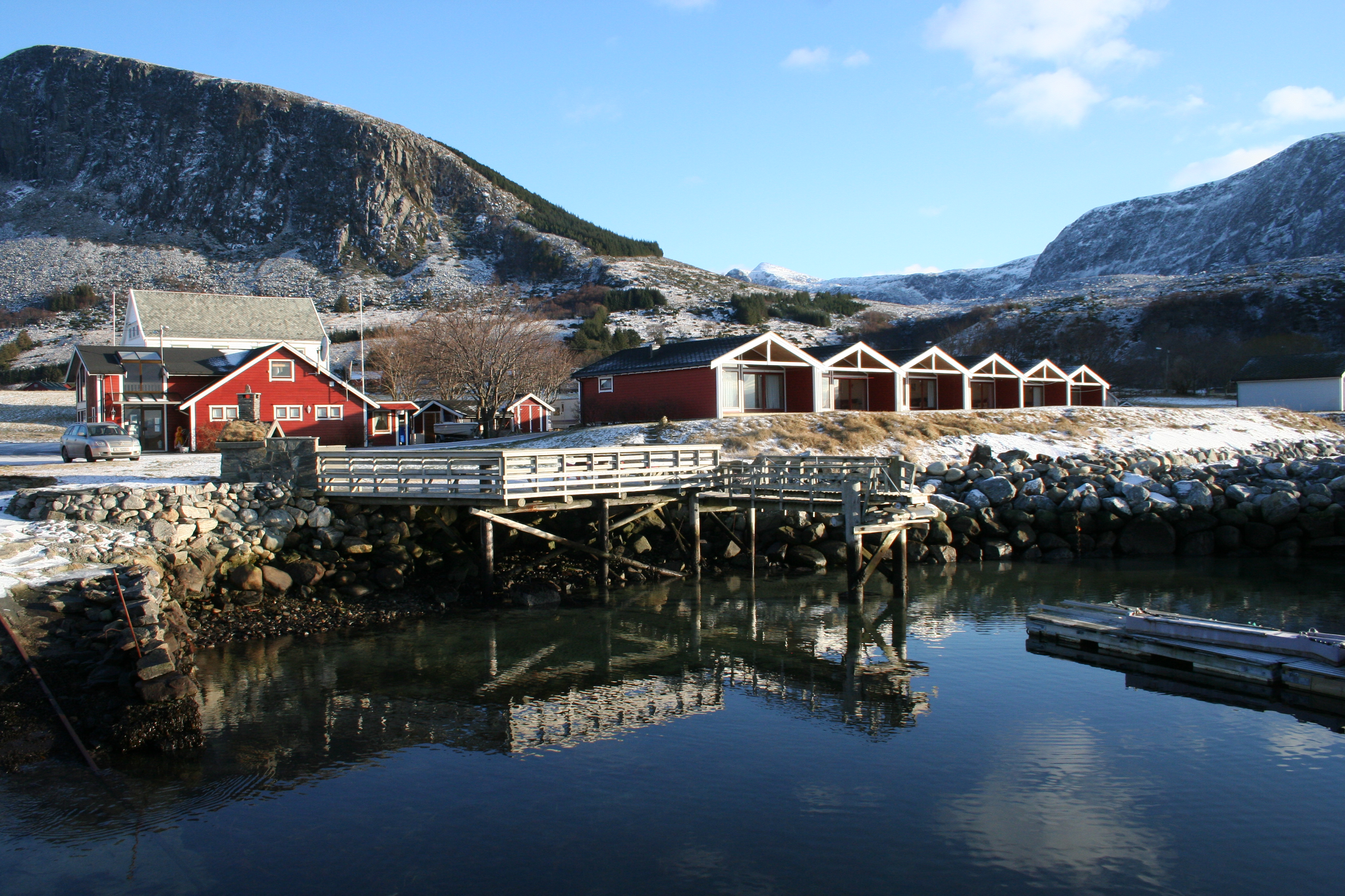 Flø in Ulstein, Norway